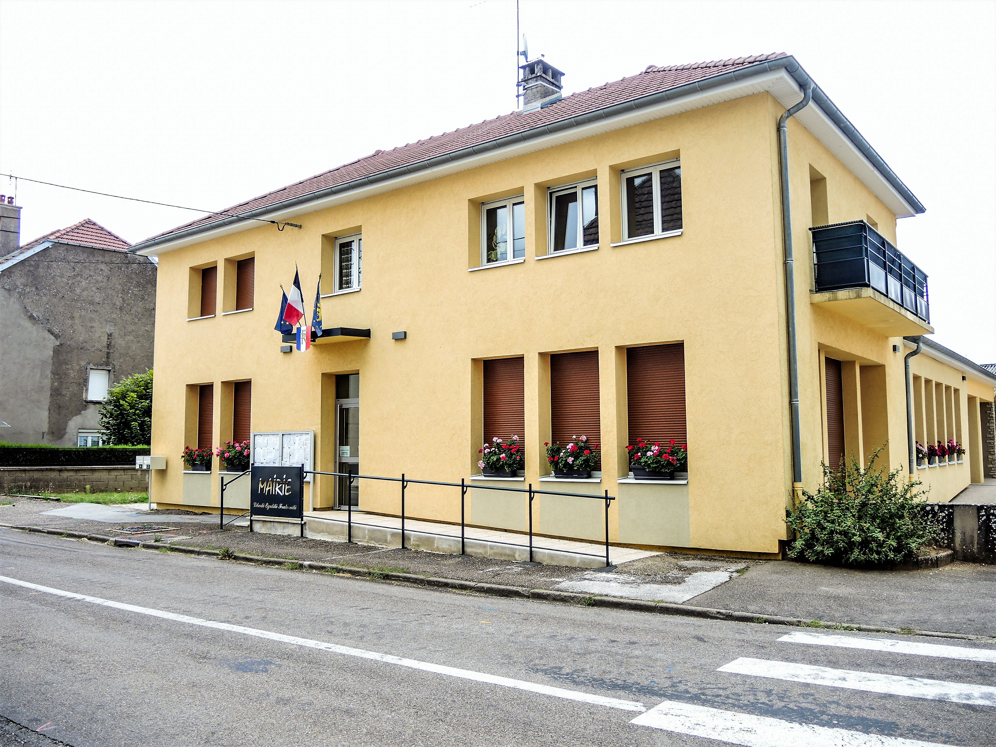 Mairie